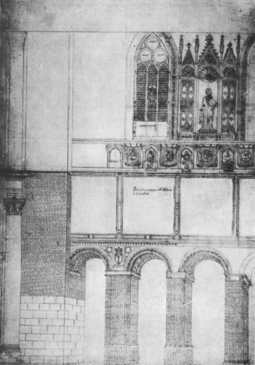 Francesco borromini, affreschi di san giovanni in laterano di gentile da fabriano e pisanello